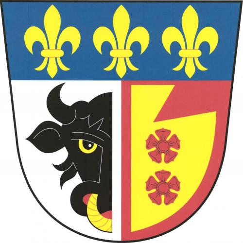 Ostrov, okres Ústí nad Orlicí, znak